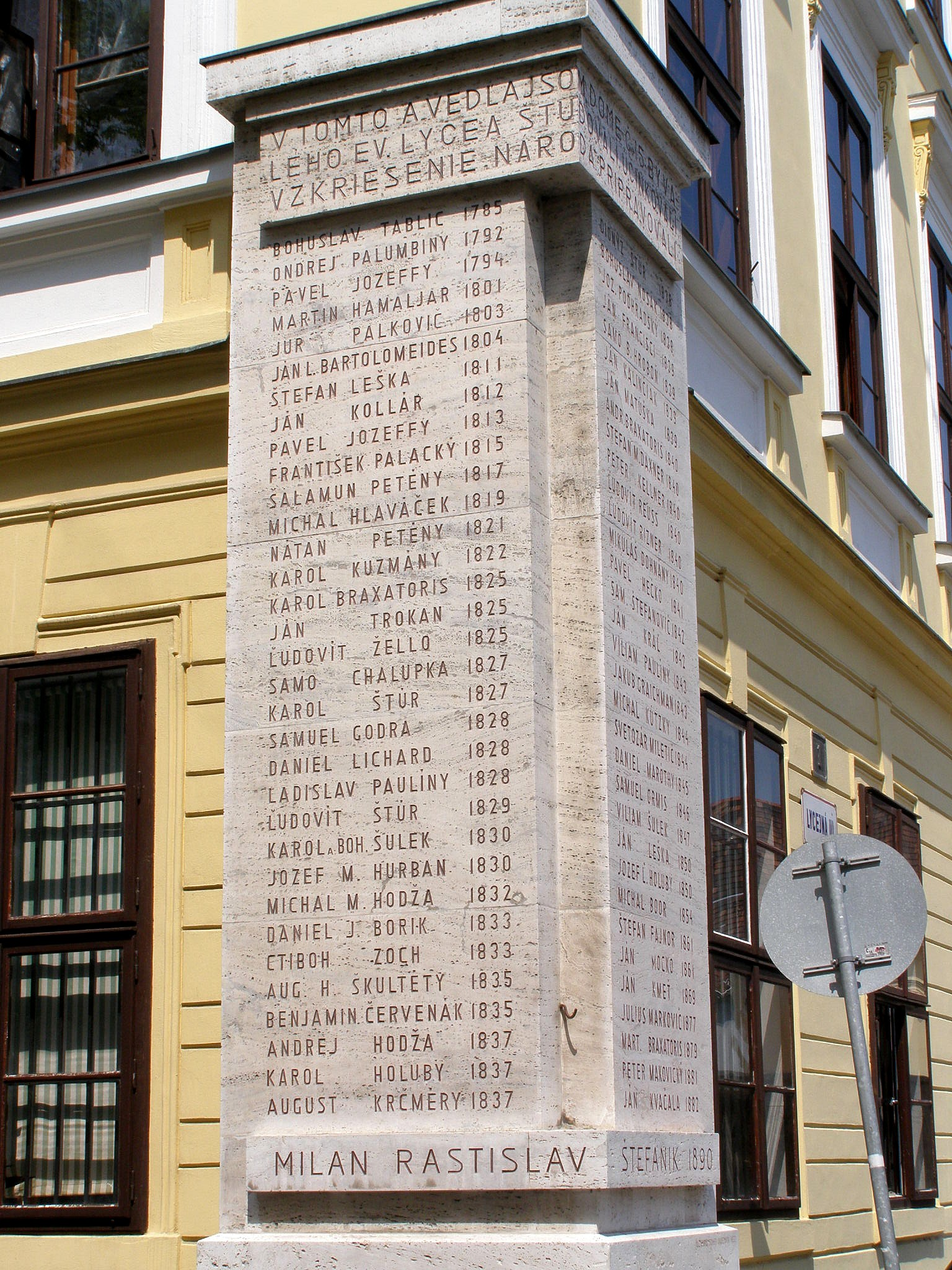 Pamätná doska na nároží budovy bývalého Evanjelického lýcea (nového) na Konventnej ul. č. 13. Obsahuje šesťdesiatsedem mien najvýznamnejších študentov lýcea. Autorom pamätnej dosky je Milan Michal Harminc Object location48° 08′ 49.92″ N, 17° 06′ 16.92″ E